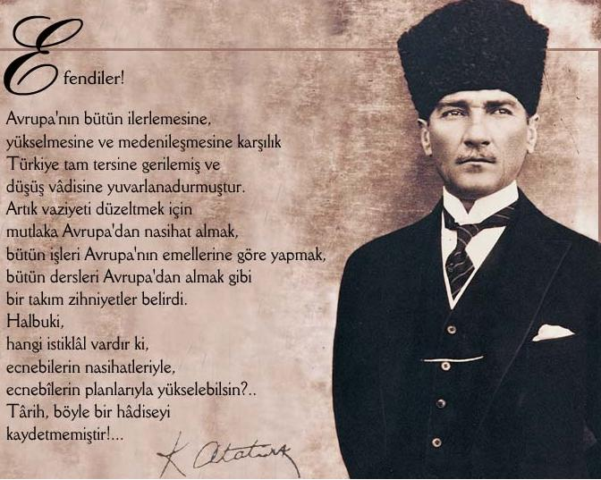 ATATÜRKÜM